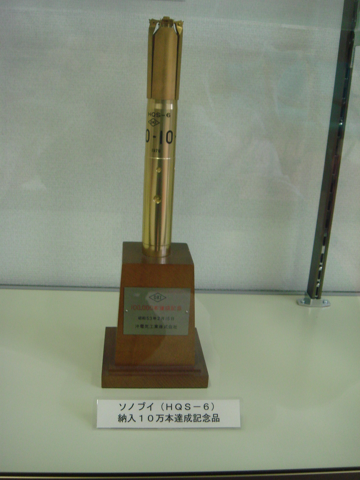 海上自衛隊 HQS-6型ソノブイ。 08年7月19日 海上自衛隊下総航空基地にて。